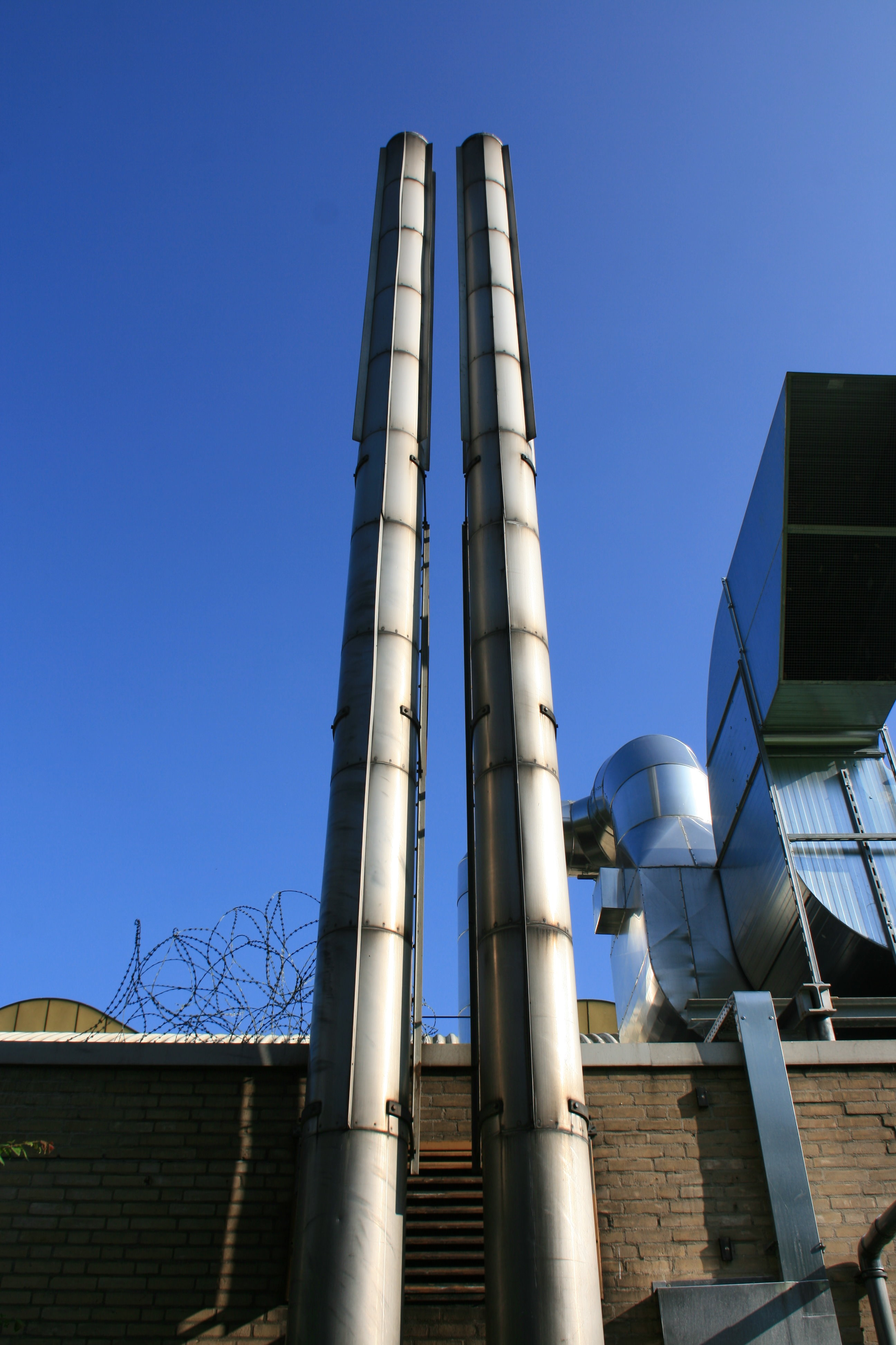 Bürgerbad, Zum Sportzentrum in Hückeswagen